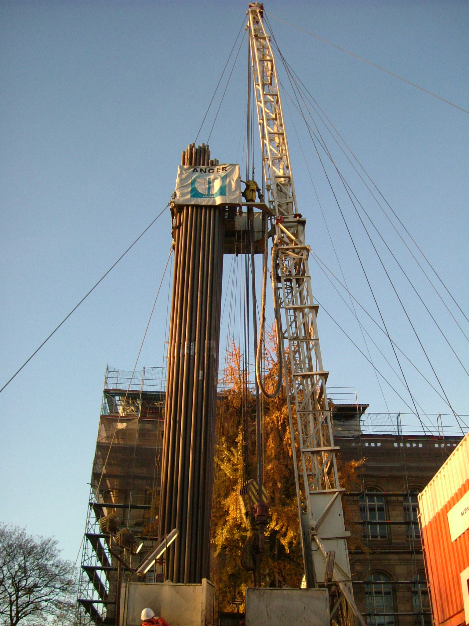 Blick auf die Bohranlage der Geothermiebohrung für das SuperC-Gebäude, November 2004